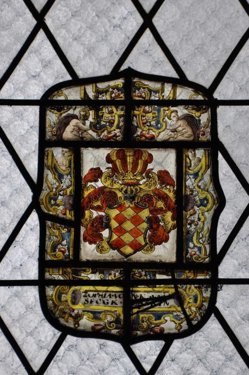 Herb Zofii von Konigseck na witrażu w Szynwałdzie